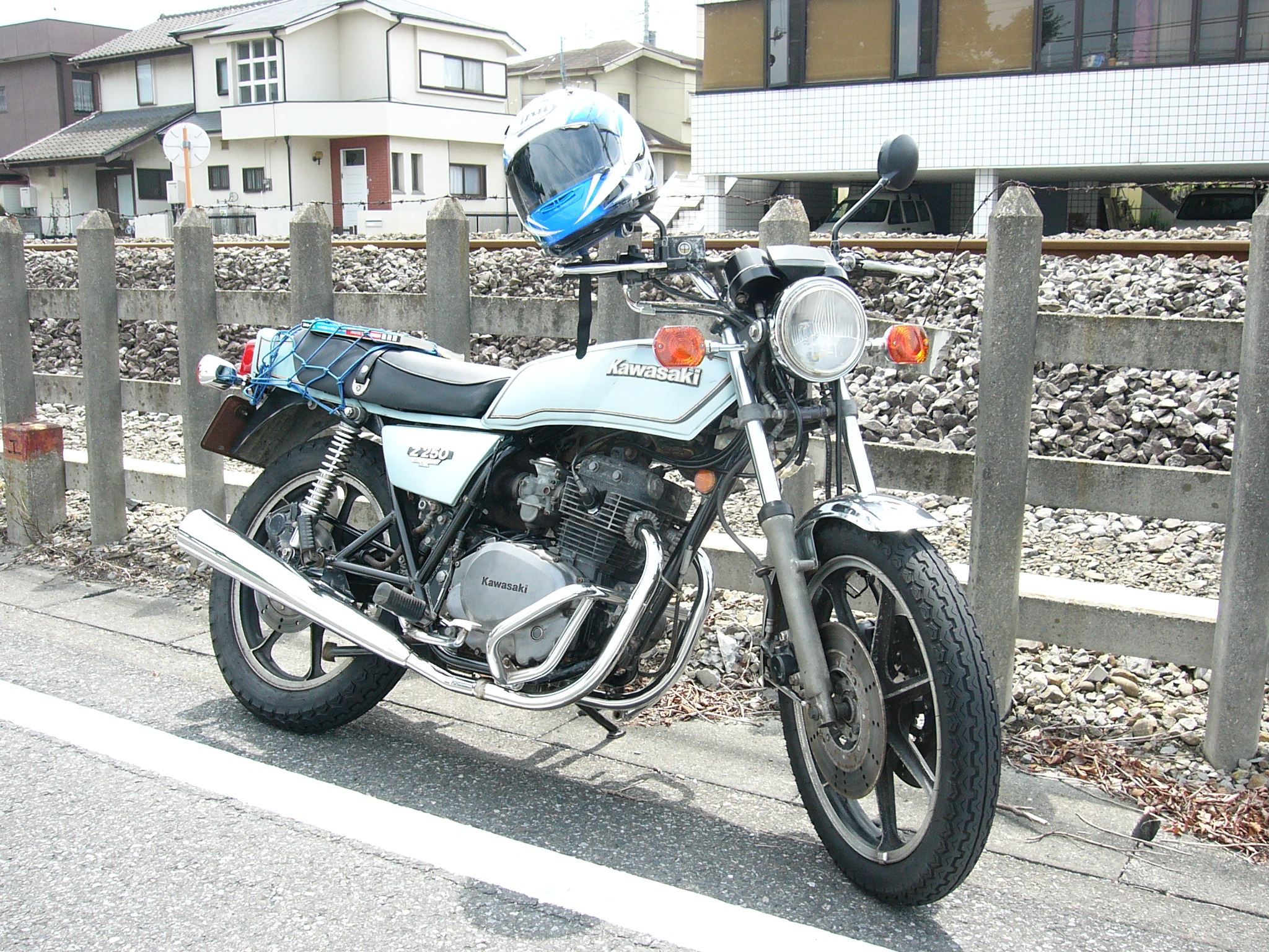 サイドビュー